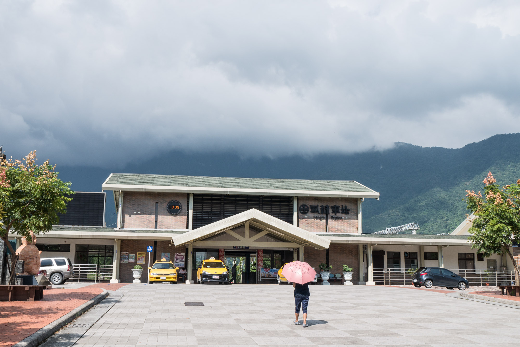 鳳林車站